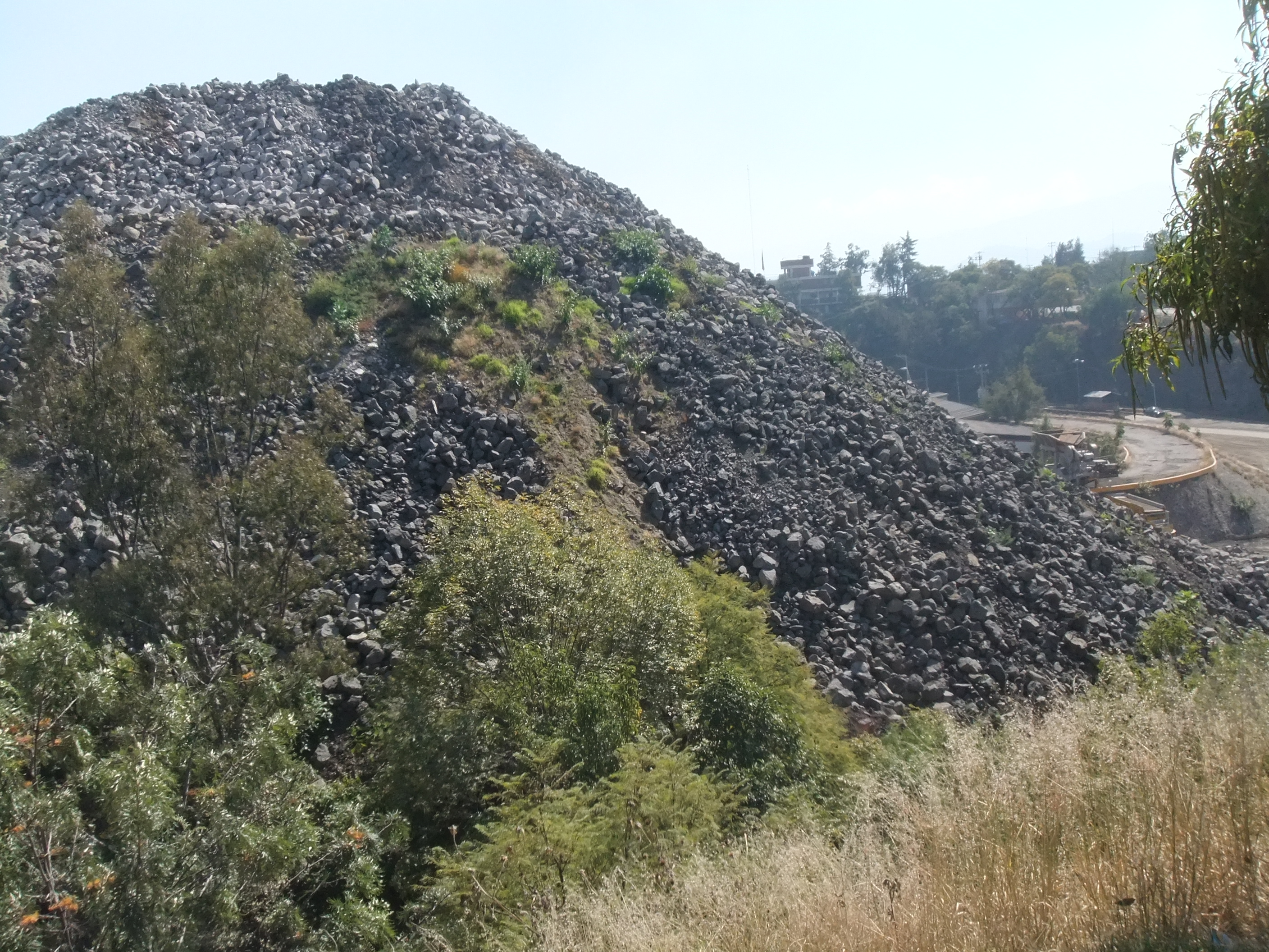 Una parte interior del lugar donde el equipo mexicano de fútbol Pumas Universidad practica. Este lugar es conocido como la "Cantera de los Pumas"